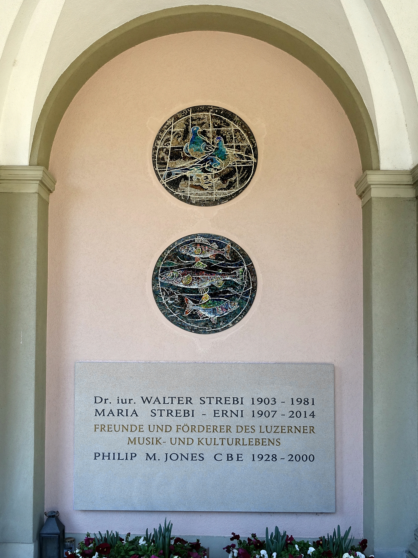 Philip M. Jones (1928–2000) Musiker, Trompeter, Gründer des nach ihm benannten Philip Jones Brass Ensemble. Grabfeld 19 auf dem Friedhof Friedental, Stadt Luzern